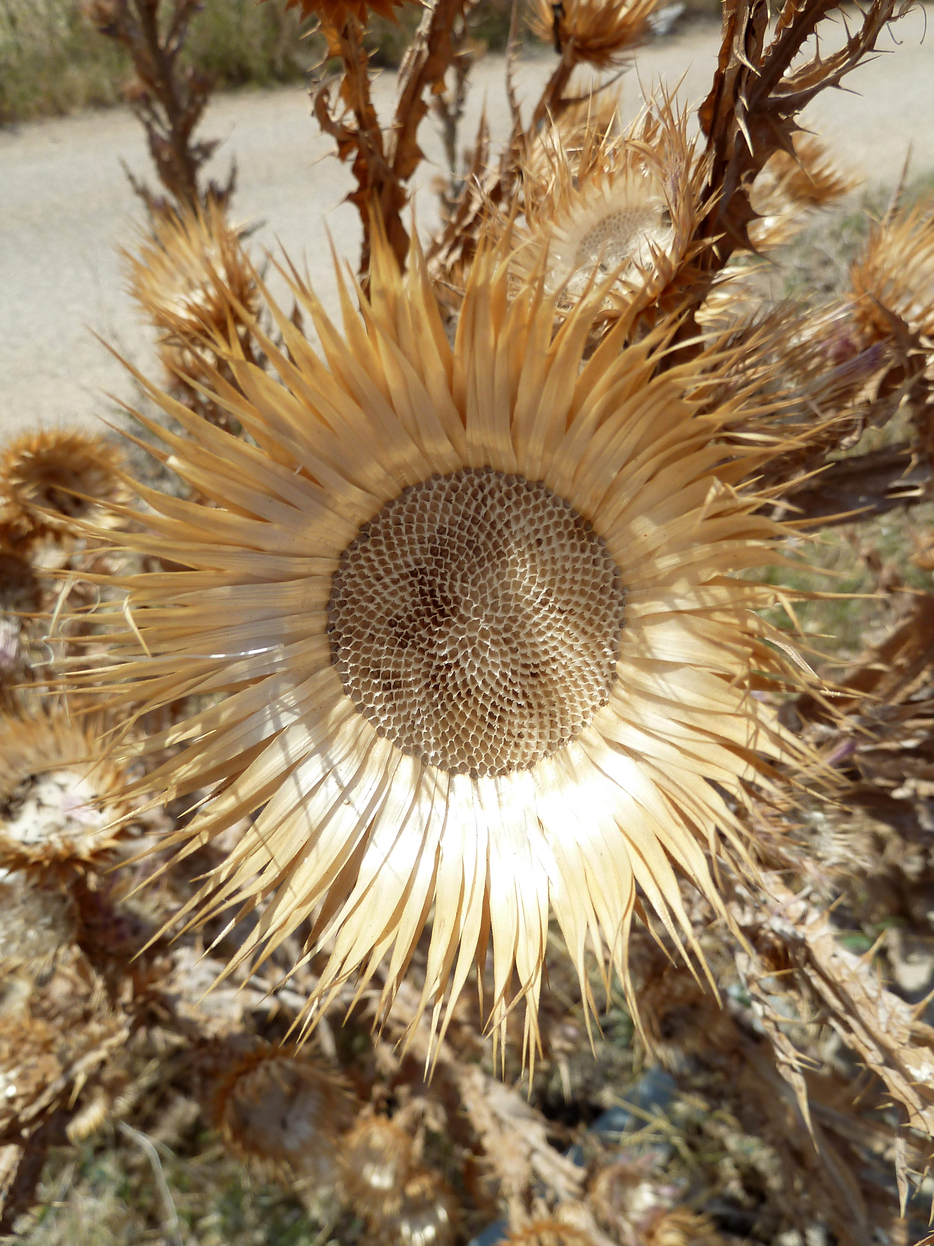 Onopordum nervosum (Cardo gigante) - Capítulo post-fructificación con cipselas in situ y receptáculo alveolado . - Carretera nacional N301, km209,250, Paraje el Carril de la Longaniza, circa La Roda (Albacete, España).